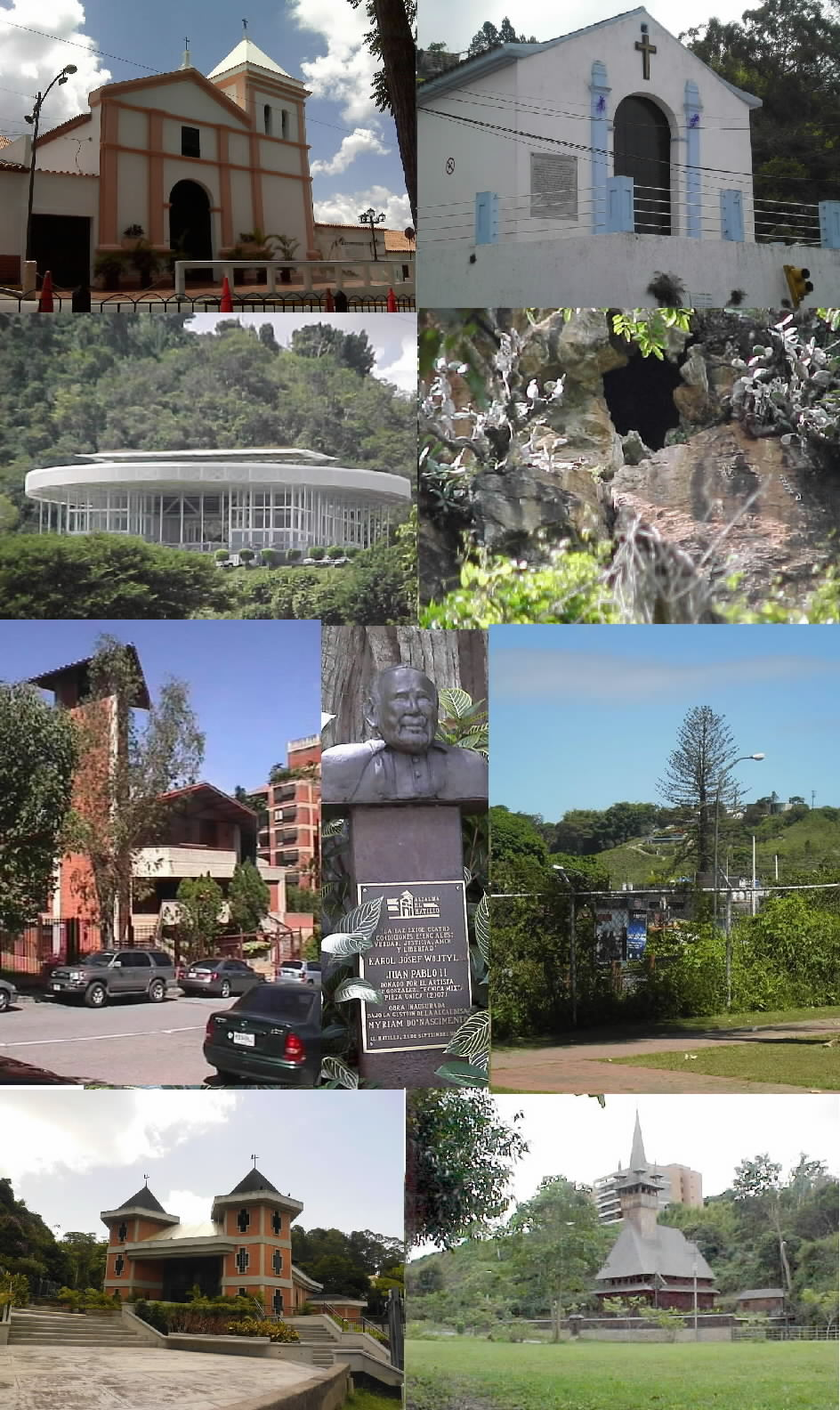 Colage El Hatillo municipality 2013 Iglesia de santa Rosalía y Capilla del El Calvario Cementerio del Este y Cuevas del Indio Iglesia de La Anunciación del Señor, Monumento al Papa Juam Pablo II y Pino de El Hatillo Iglesia de Santa Ana e Iglesia de San Constantino y Santa Elena